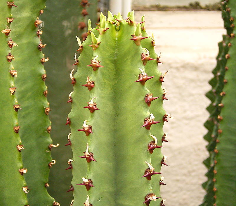 Euphorbia ammak BG Heidelberg, Germany